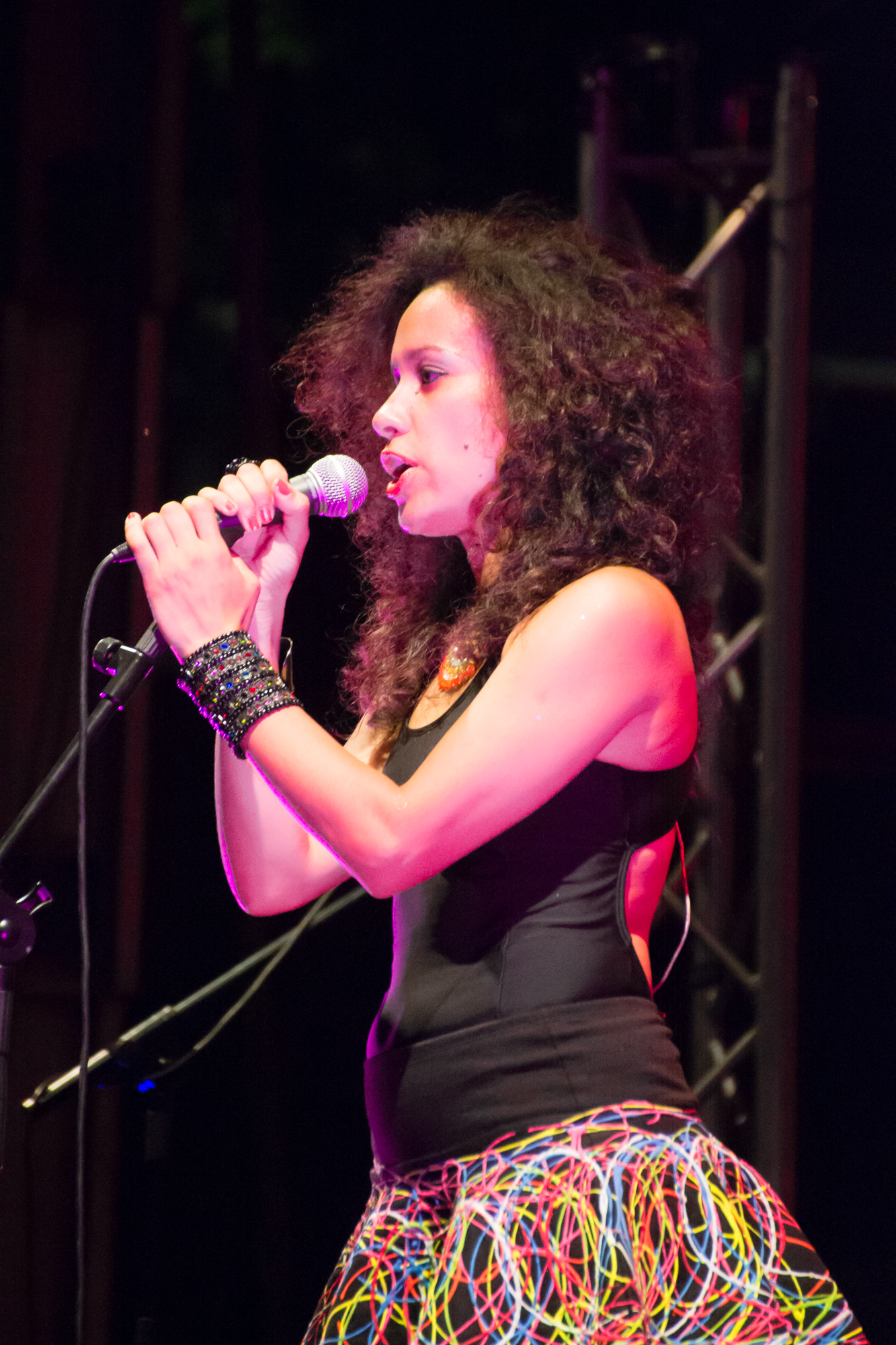 Die argentinische Singer-Songwriterin Mariana Yegros aka La Yegros auf der Detmolder Sommerbühne 2014